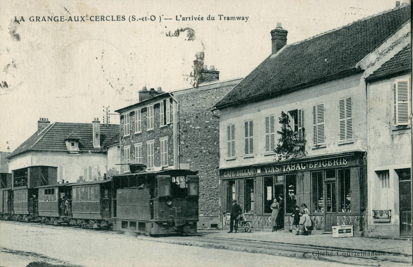 Carte postale ancienne, sans mention d'éditeur, cliché CourtemancheLA-GRANGE-AUX-CERCLES (Ballainvilliers) - L'arrivée du tramwayIl s'agit d'une rame de l'Arpajonnais tracté par la locomotive à vapeur bicabine n°15 construite par Tubize